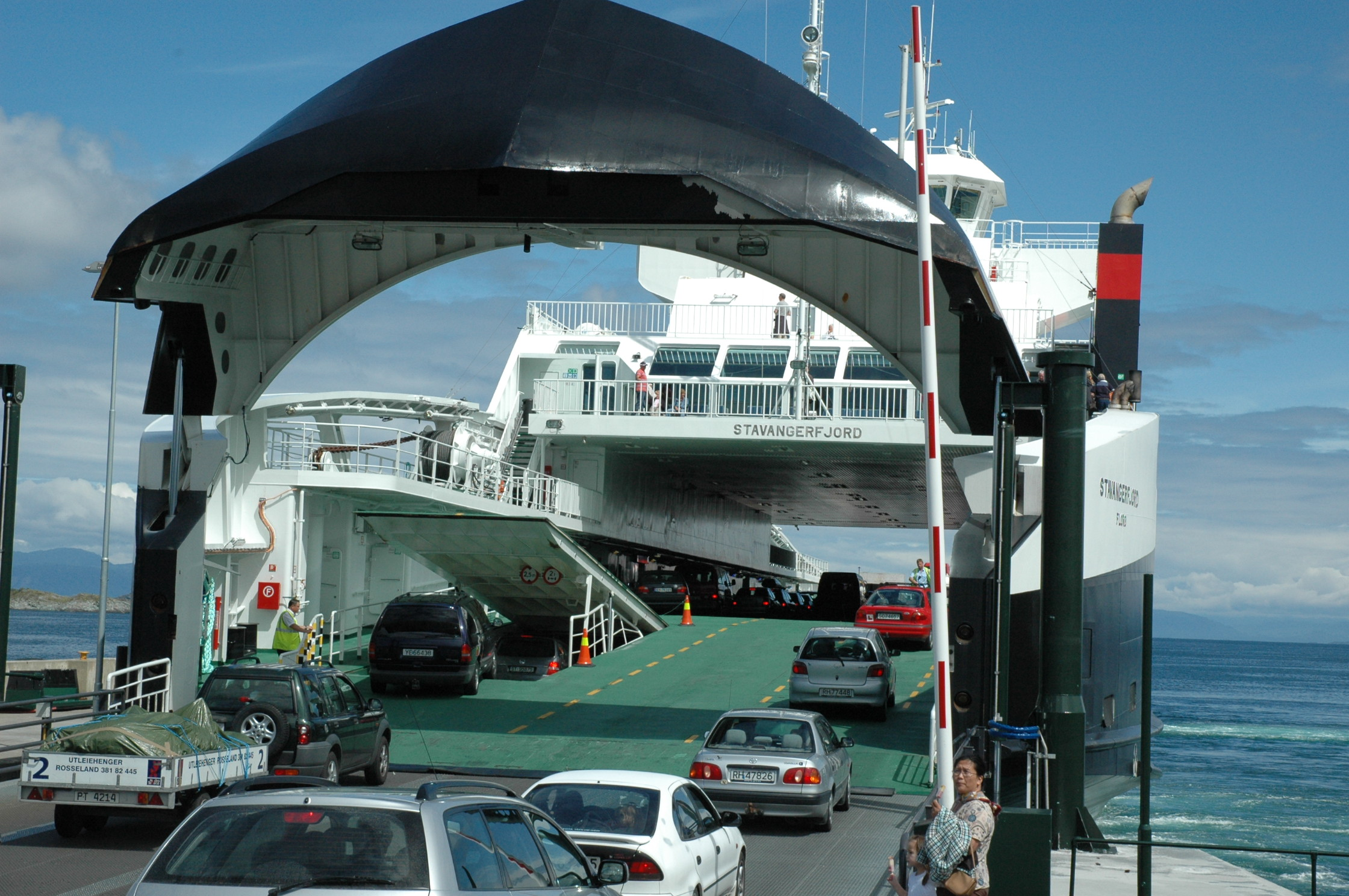 M/F Stavangerfjord med åpen bauport ved kai i Arsvågen